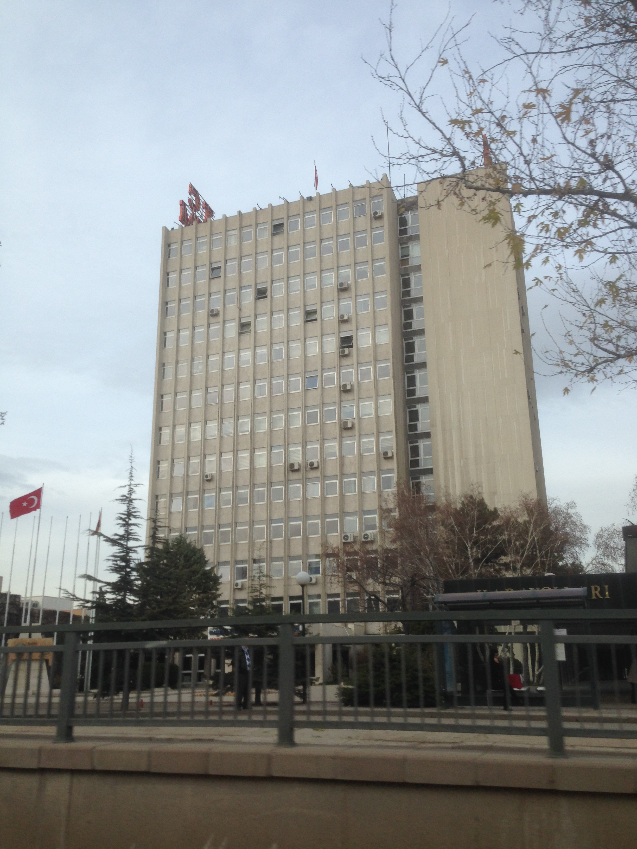 TC Karayolları Genel Müdürlüğü Binası